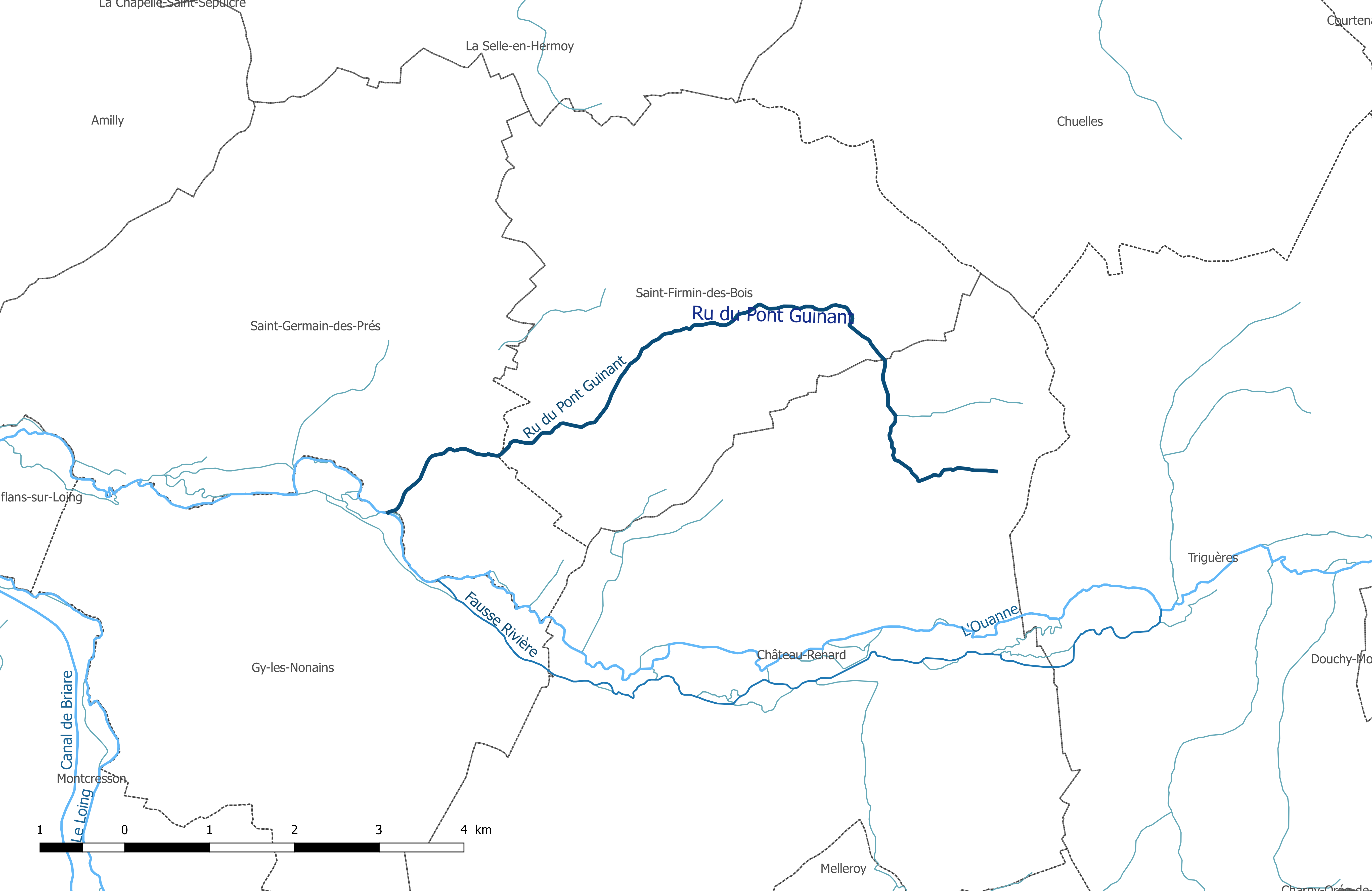 Carte du cours d'eau "le Ru du Pont Guinant", dans le département du Loiret.